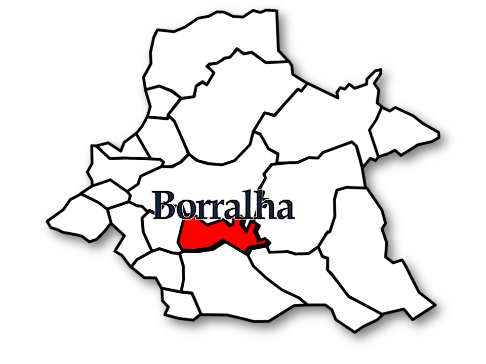 Censos 1864/2011